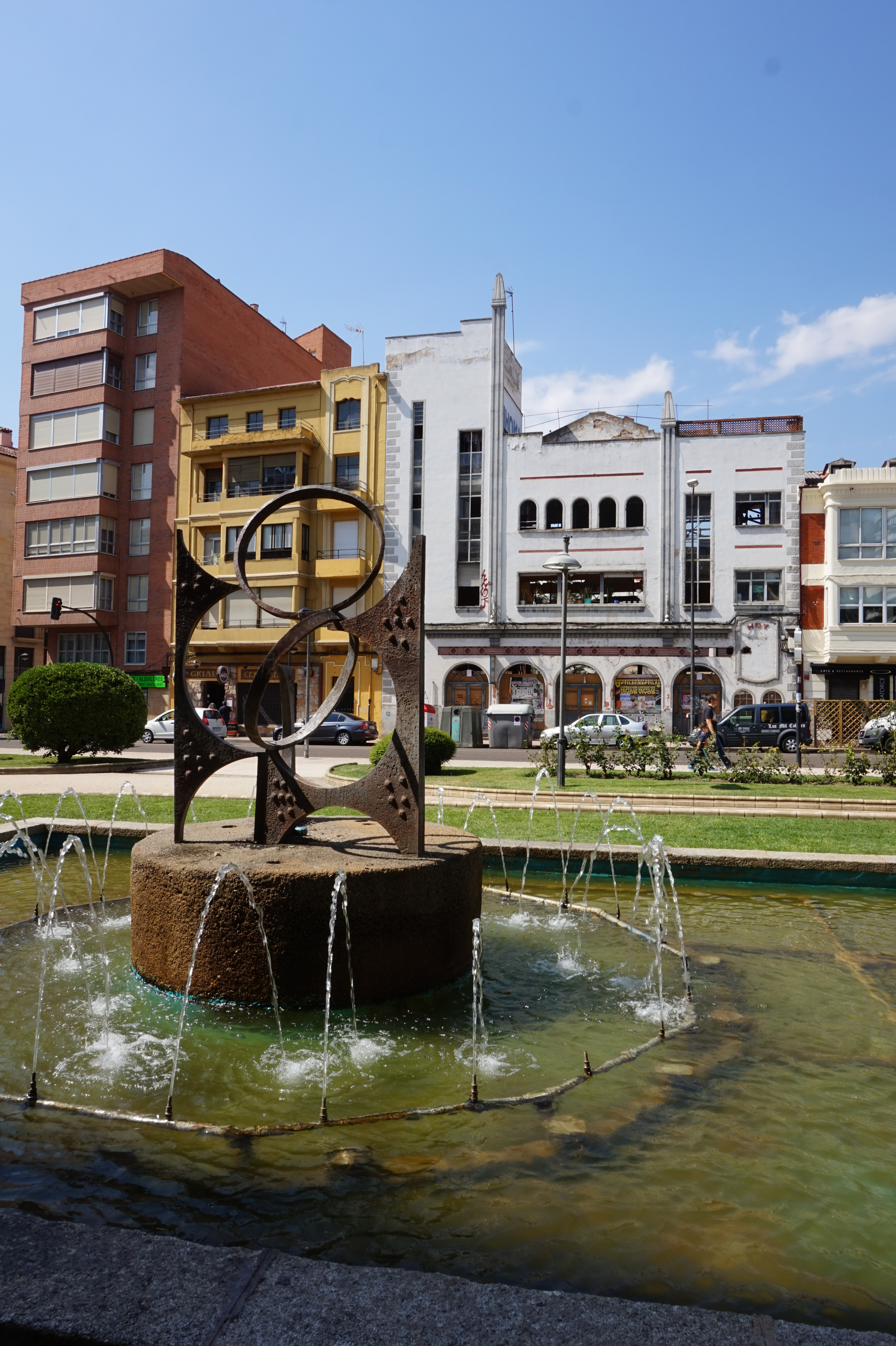 Escultura en Avda. de Portugal 14 - En el fondo se puede ver el Cine Barrueco ya abandonado en 2015